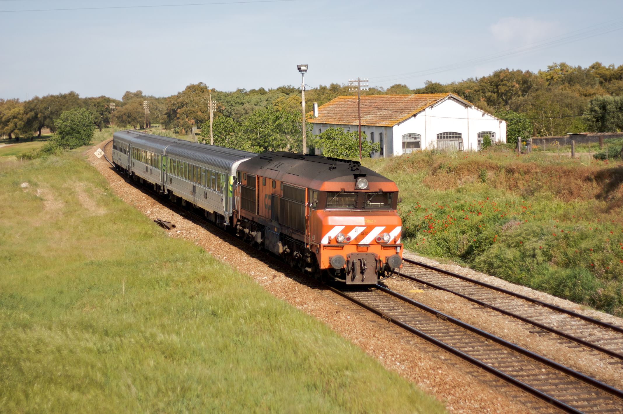 Tipo: Comboio Intercidades 690 [Lisboa • Oriente - Évora] Local: Estação de Casa Branca [Linha do Alentejo, PK 90 • Linha de Évora, PK 90] Data e hora: 5 de Abril de 2009 [09h47] Material: Locomotiva 1932 + 3 carruagens Sorefame (2 Renovadas e 1 não Renovada)